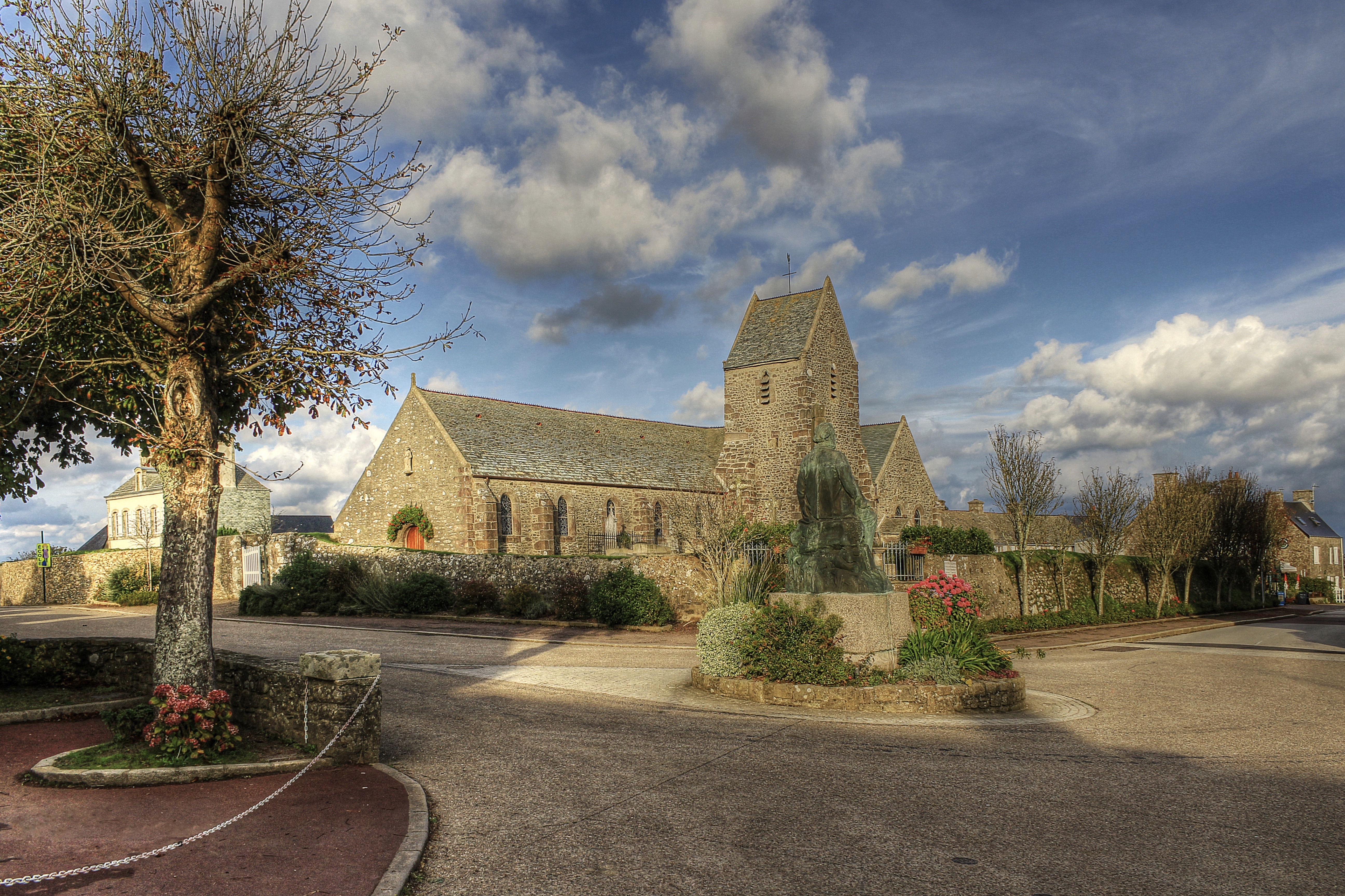 Eglise Sainte-Colombe de Gréville-Hague (Manche).